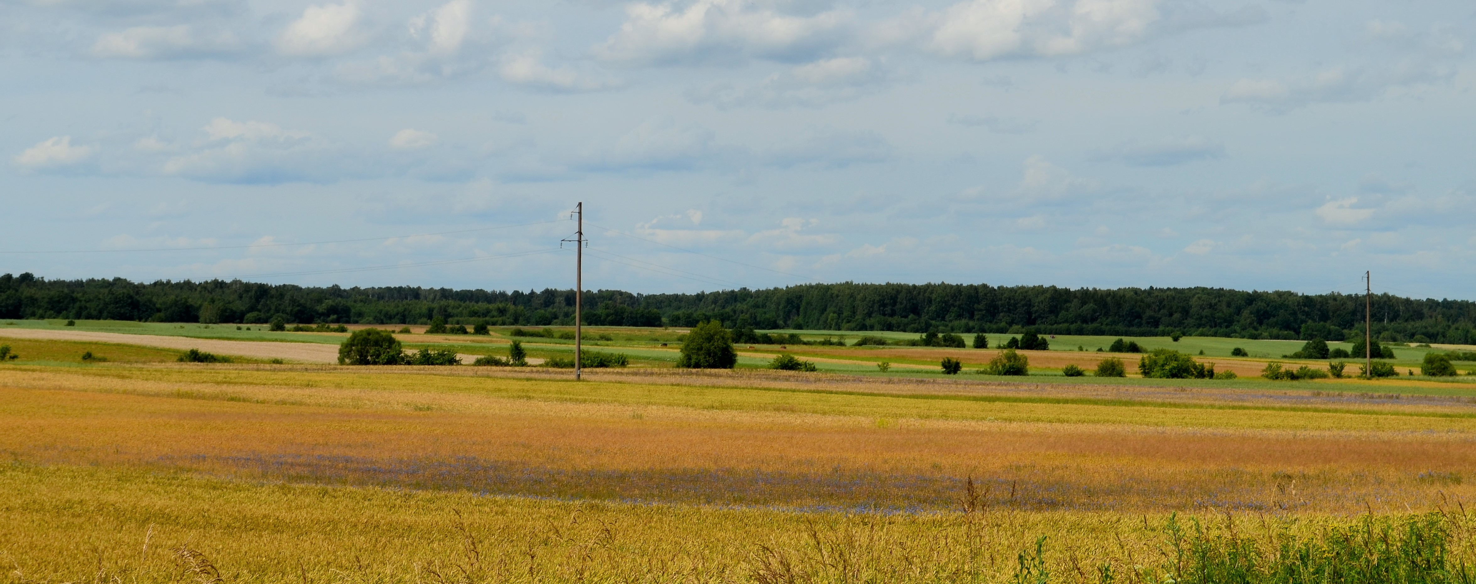 Siesikų miškas nuo Barų, Ukmergės raj.